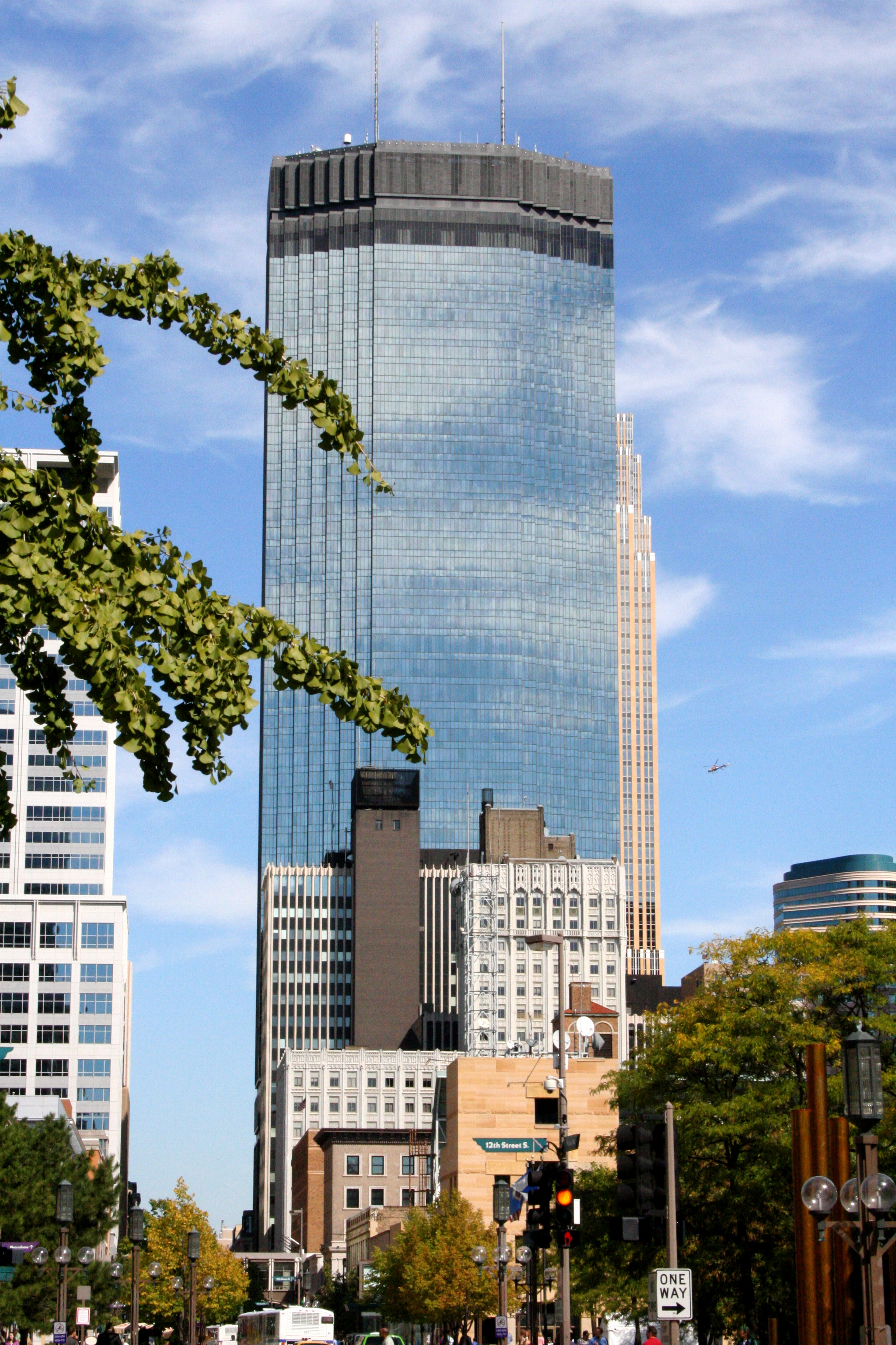 Minneapolis, Minnesota